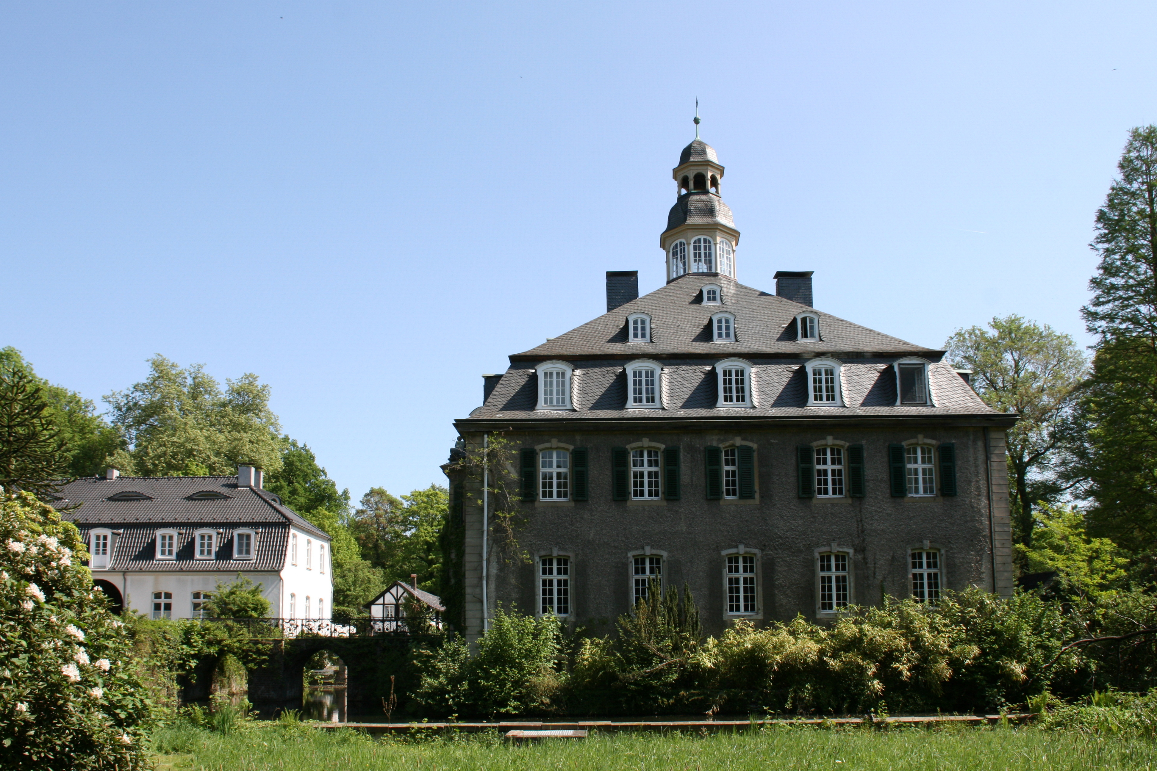 Schloss Hackhausen in Solingen